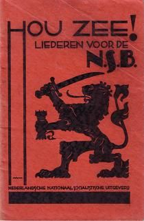 Hou Zee! liederen voor de NSB. Uitgever Nenasu.